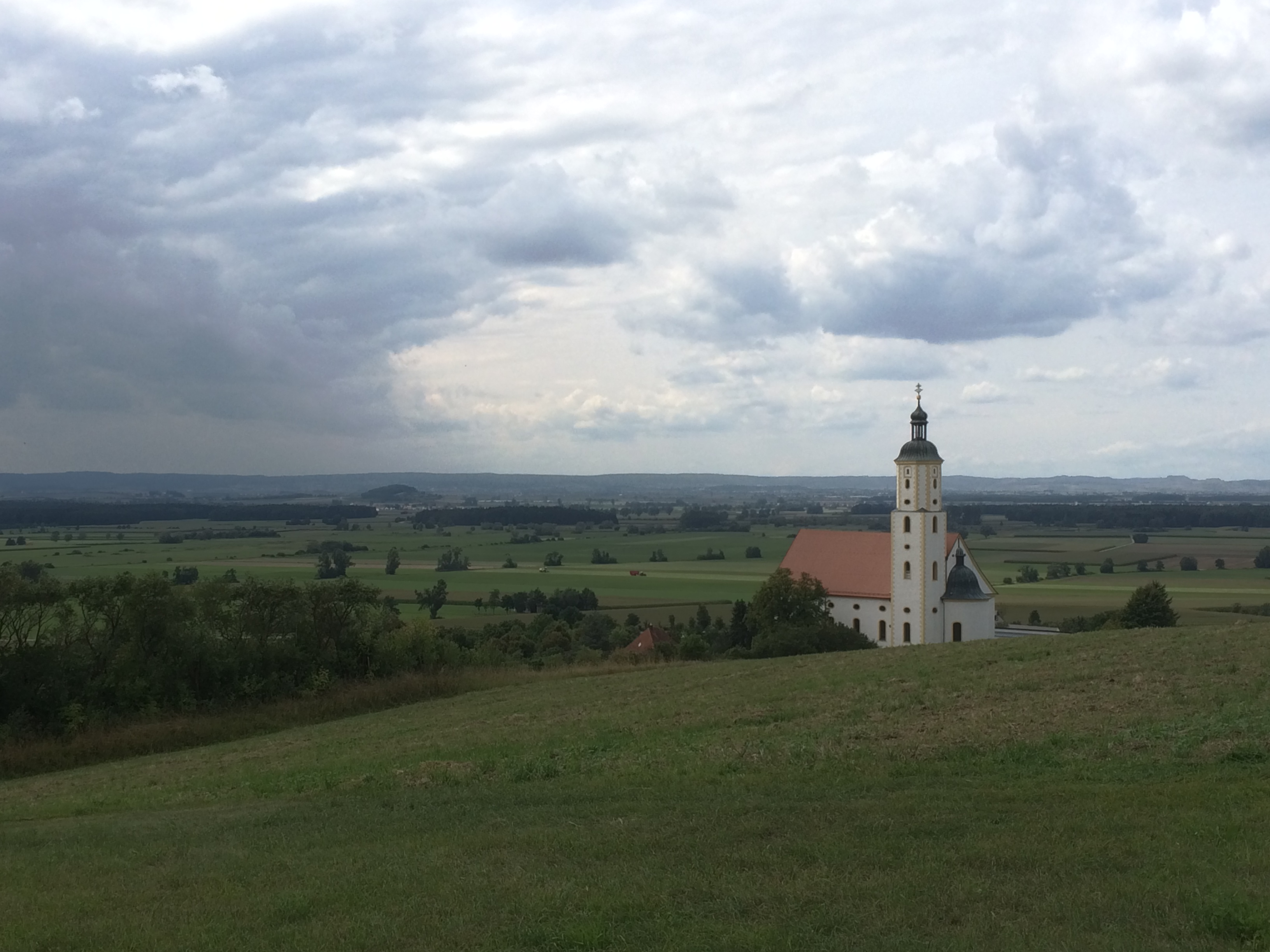 Maria Brünnlein mit Blick in das Ries